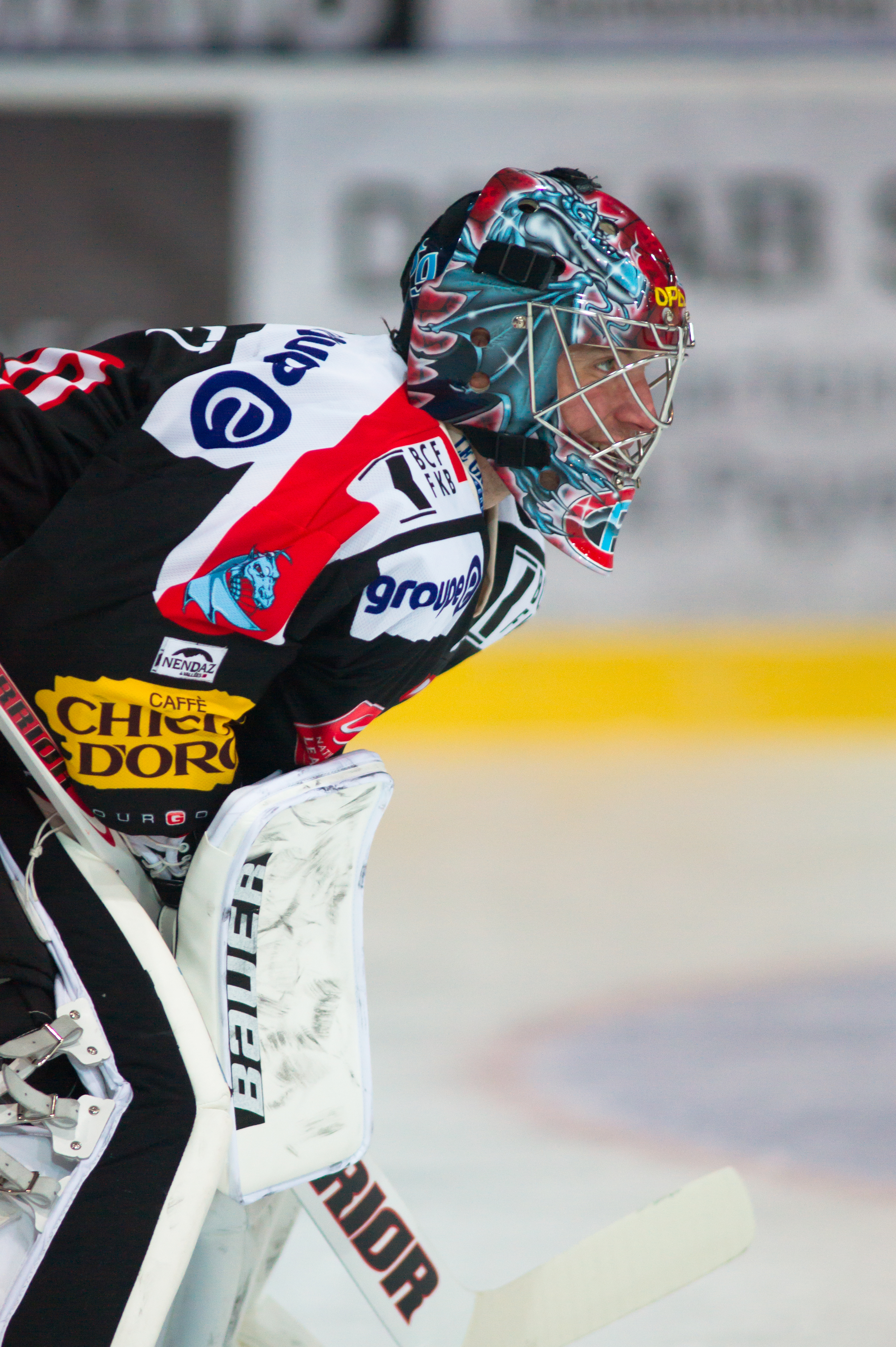 Cristobal Huet lors d'un match Fribourg - Bienne en novembre 2011.